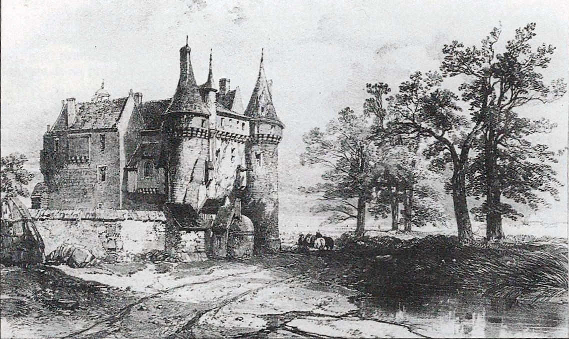 Le château de Kerouzéré (dessin d'Auguste Mayer et Eugène Cicéri paru dans "Voyages pittoresques et romantiques dans l'ancienne France, Bretagne", livre publié en 1846.